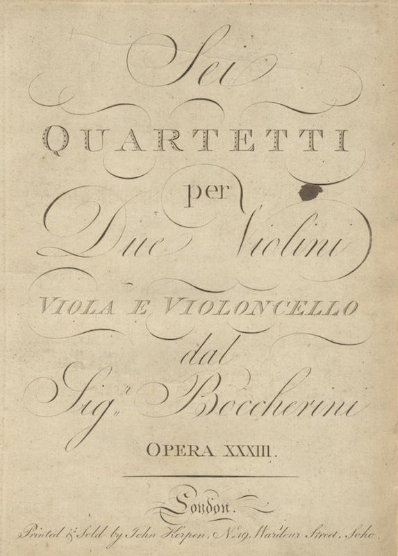 Boccherini quatuors opus 32 (op.33) édités par Kerpen, Londres.